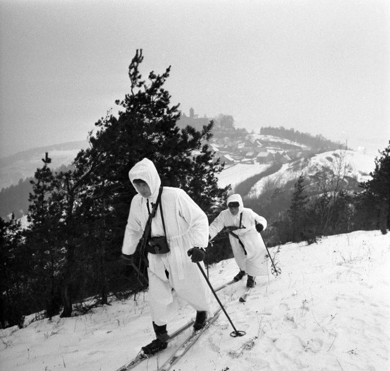 Thüringen, Grenzstreife der DDR in Wintertarnanzügen Zentralbild Kohls 18.2.1965 Zum Jahrestag der Nationalen Volksarmee Zum 9. Mal jährt sich am 1. März 1965 der Tag der Nationalen Volksarmee. Aus diesem Anlaß besuchten wir eine Grenzeinheit im Bezirk Erfurt, um über ihren verantwortungsvollen Dienst und das Leben unserer Soldaten zu berichten. UBz.: Ein Postenpaar auf Grenzstreife (im Hintergrund die Burg Hanstein im Eichsfeld). Postenführer Gefreiter Reiner Gerhardt (vorn) aus Meuselwitz, Kreis Altenburg und Soldat Eckard Hofmann aus Kmelen, Kreis Senftenberg.